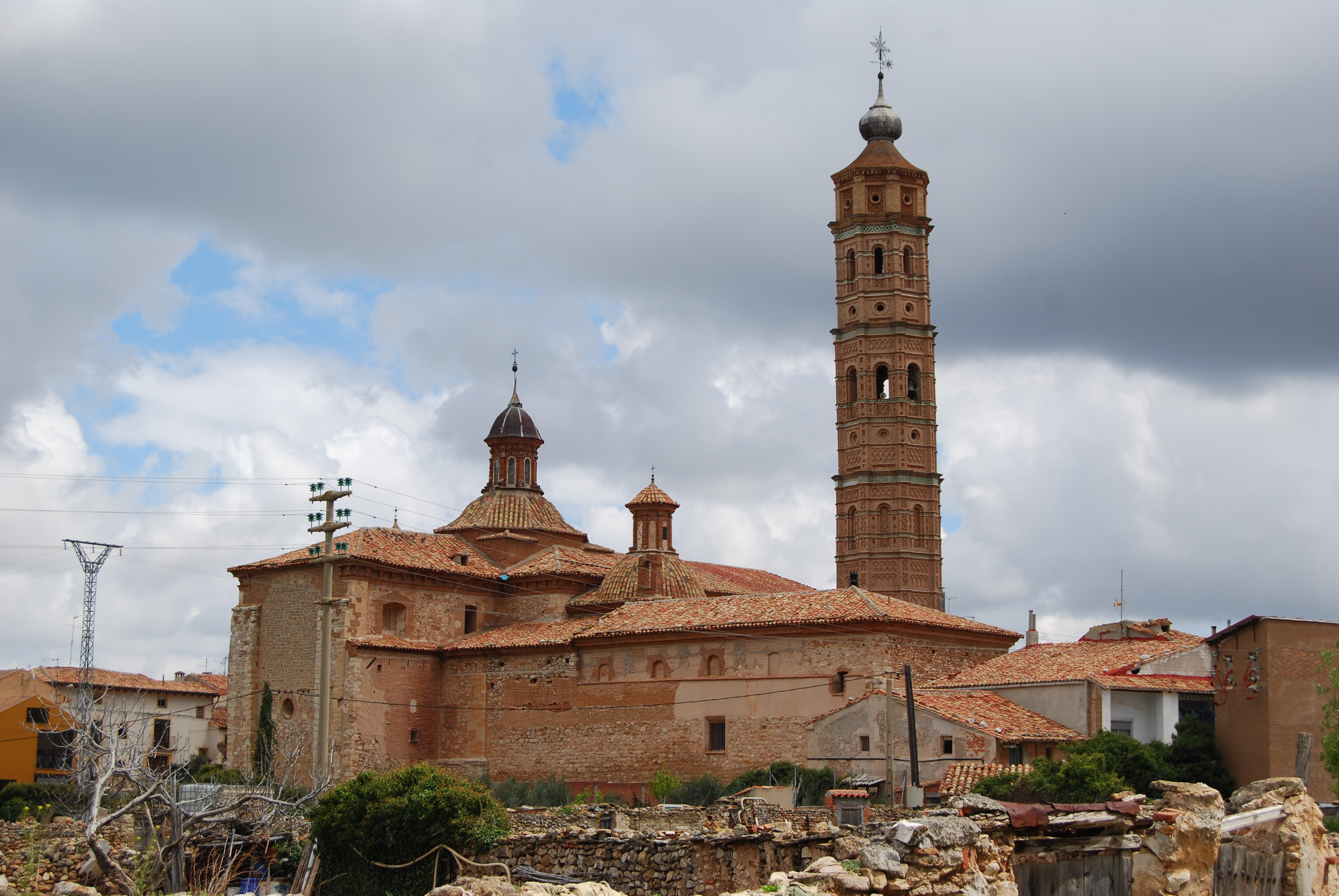 Iglesia mudéjar de Muniesa, Aragón, España. S.XVIII.